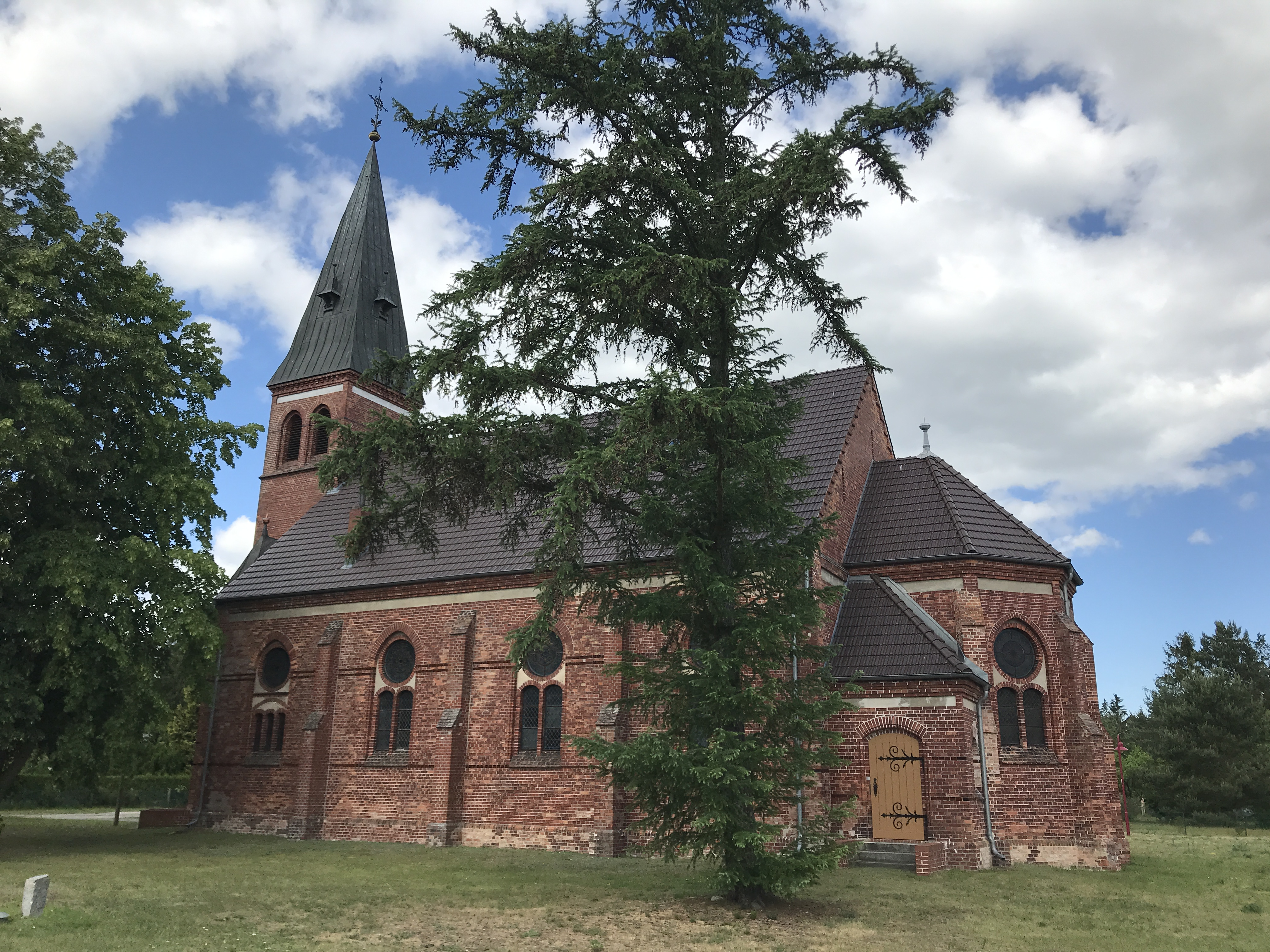 Die Kirche St. Johannis ist eine Saalkirche aus dem Jahr 1899 in Hintersee, einer Gemeinde im Landkreis Vorpommern-Greifswald in Mecklenburg-Vorpommern. Die Kirchenausstattung stammt aus der Bauzeit.